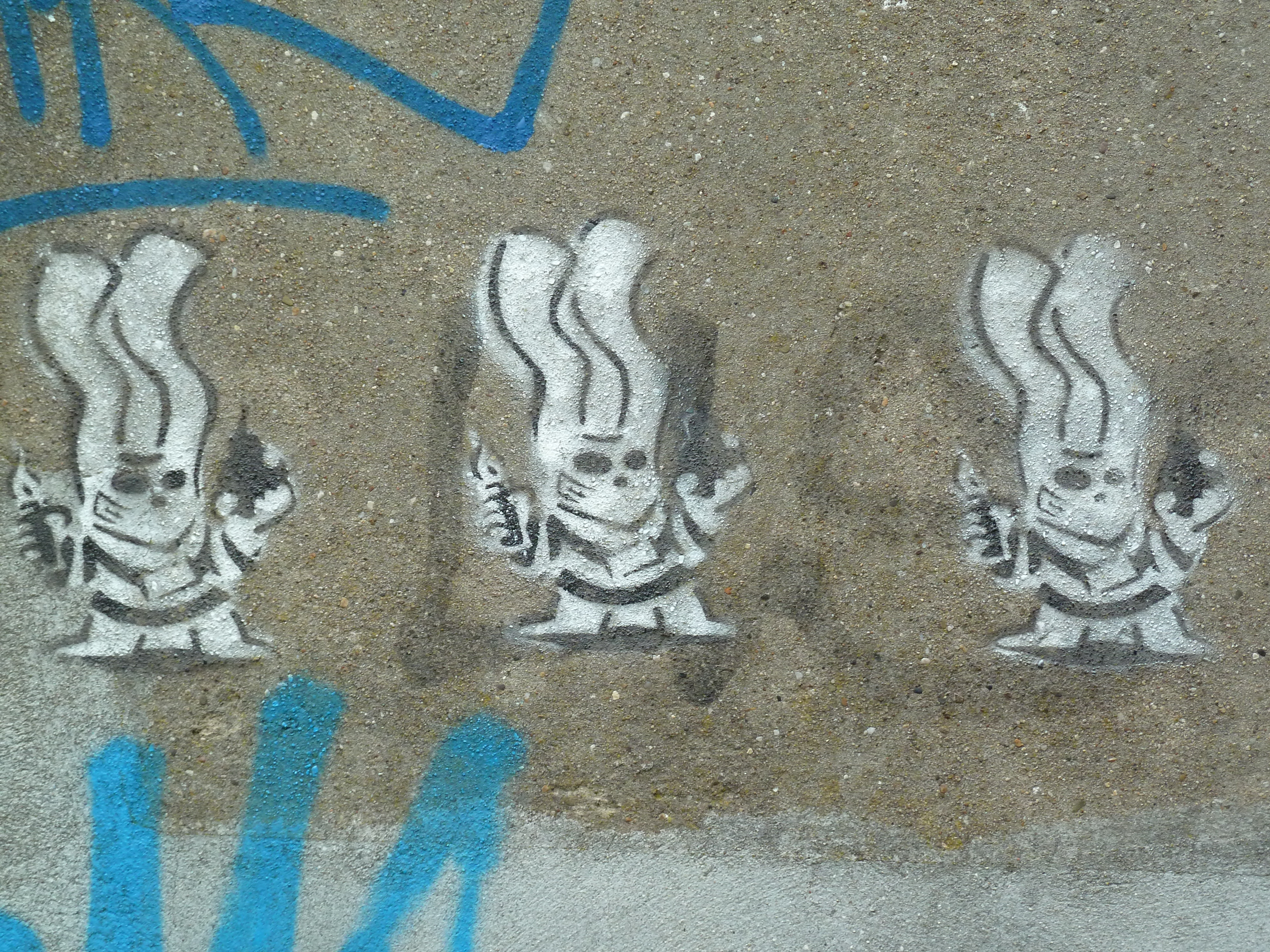 Graffiti van Bunbun, nabij Griftpark, Utrecht, NL.